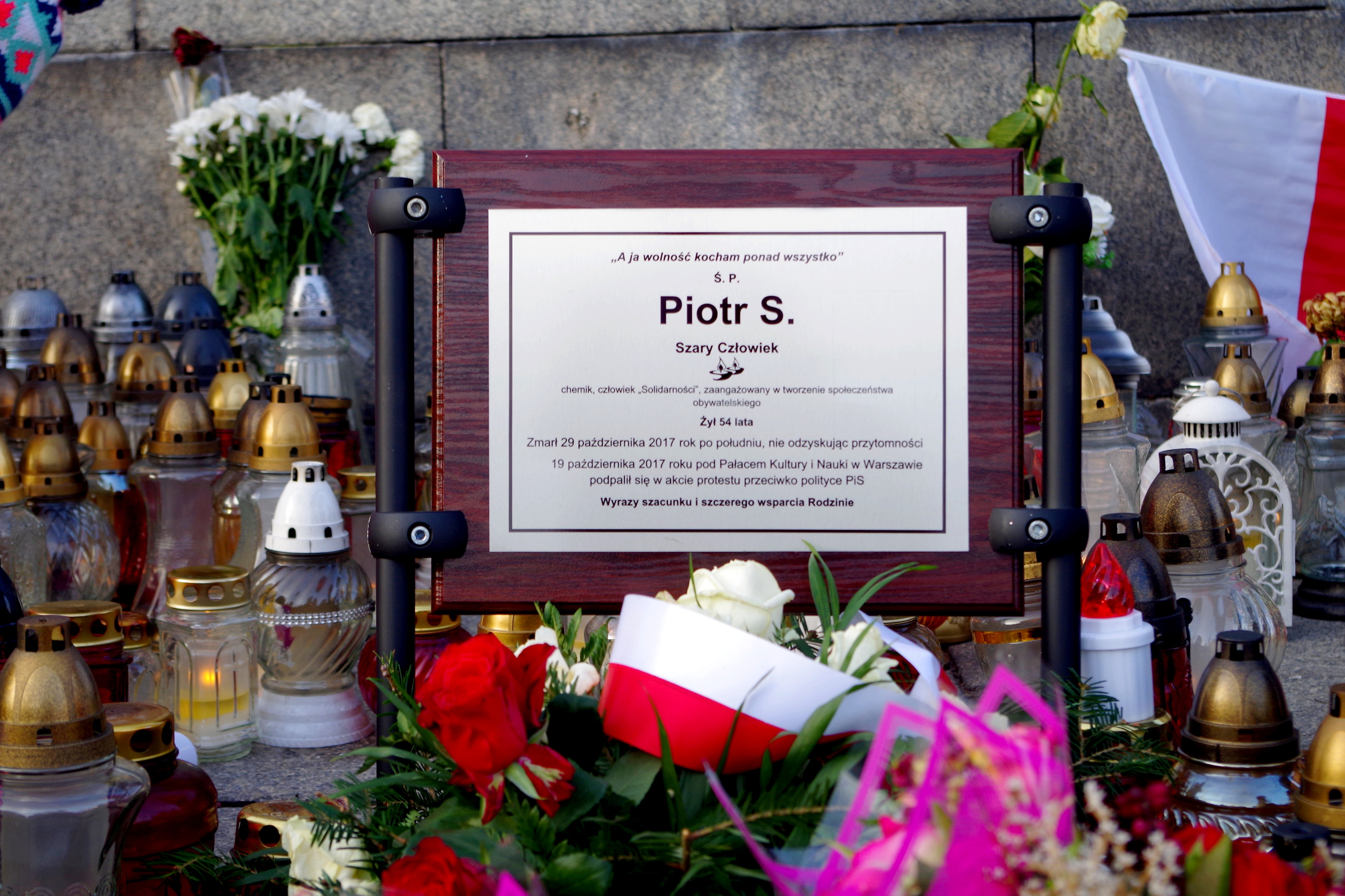 Kwiaty i znicze na Placu Defilad w Warszawie, w miejscu w którym 19 października 2017 dokonał samospalenia Piotr Szczęsny